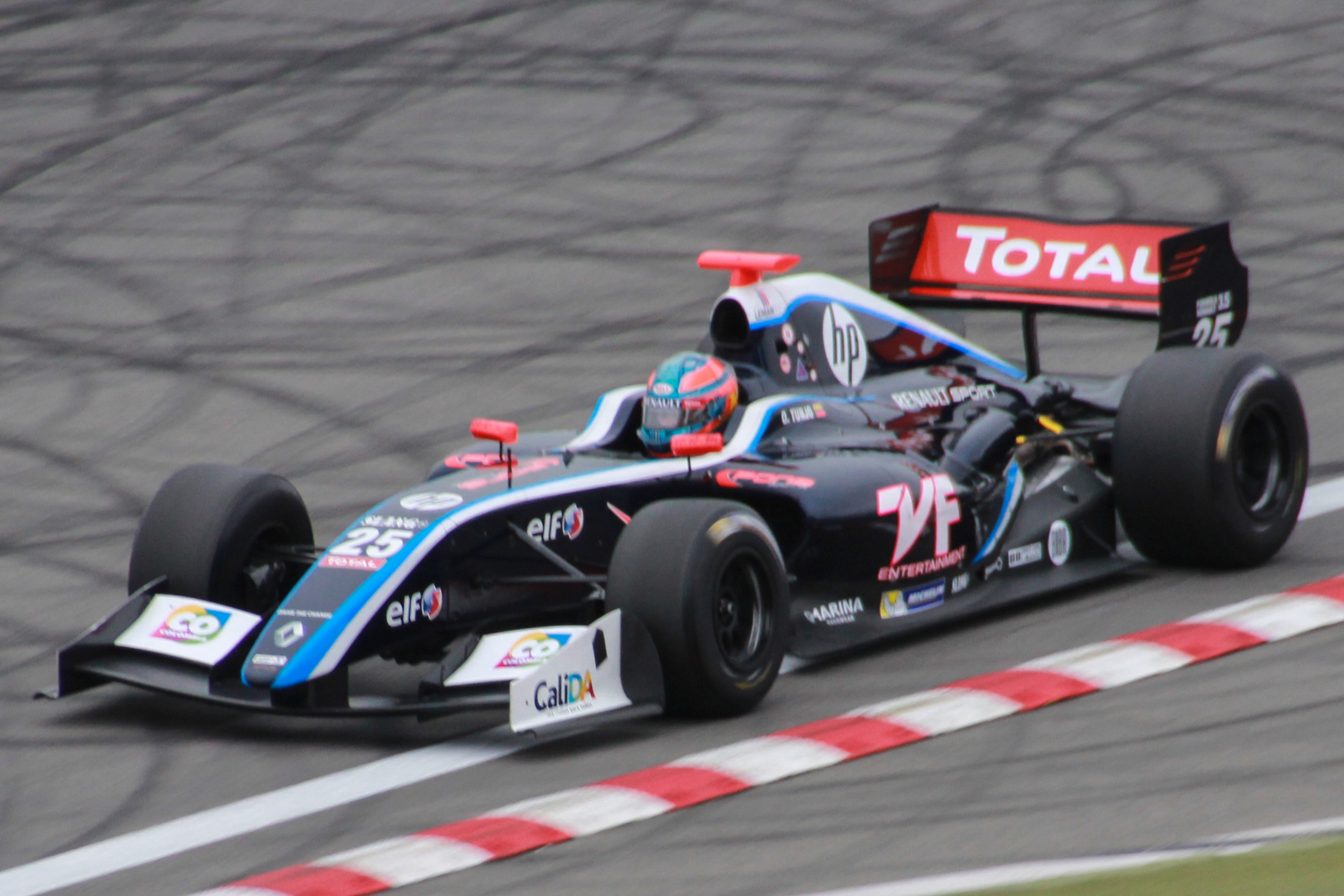 Óscar Tunjo beim ersten Rennen der Formel Renault 3.5 auf dem Nürburgring 2014